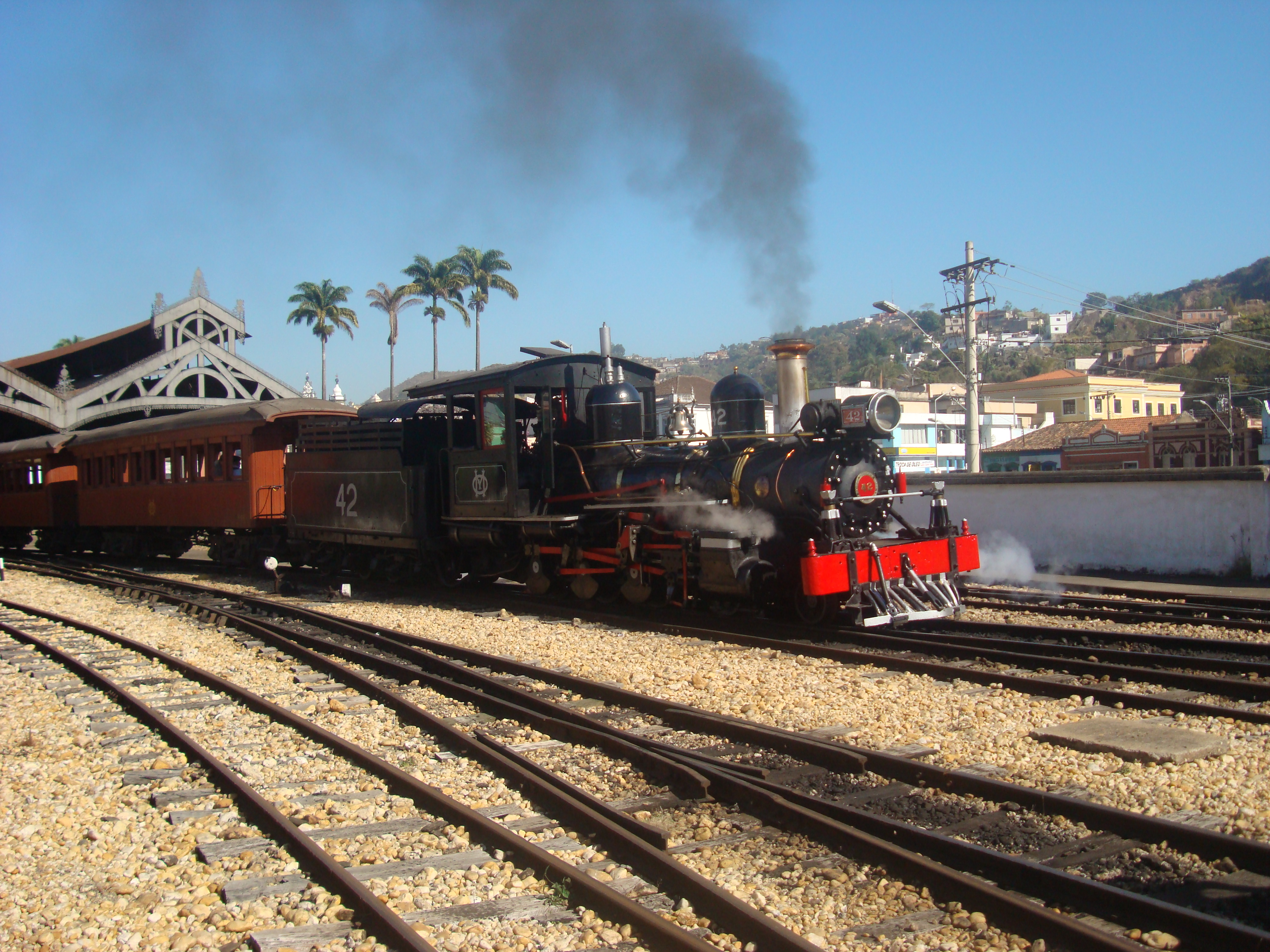 Maria Fumaça da FCA